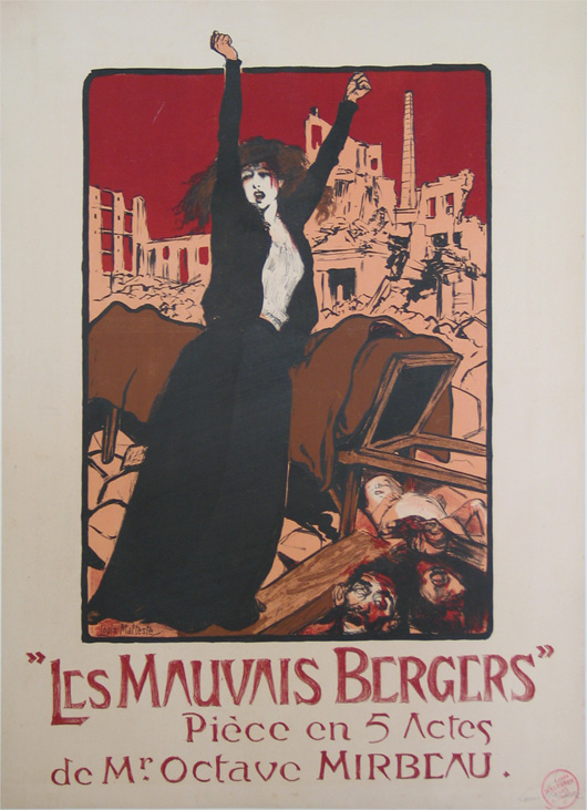 Affiche de Les Mauvais bergers, pièce d'Octave Mirbeau (1848-1917)